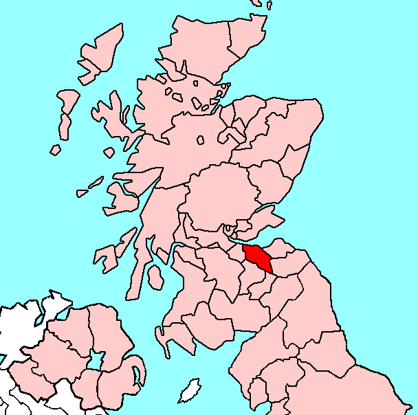 Midlothian